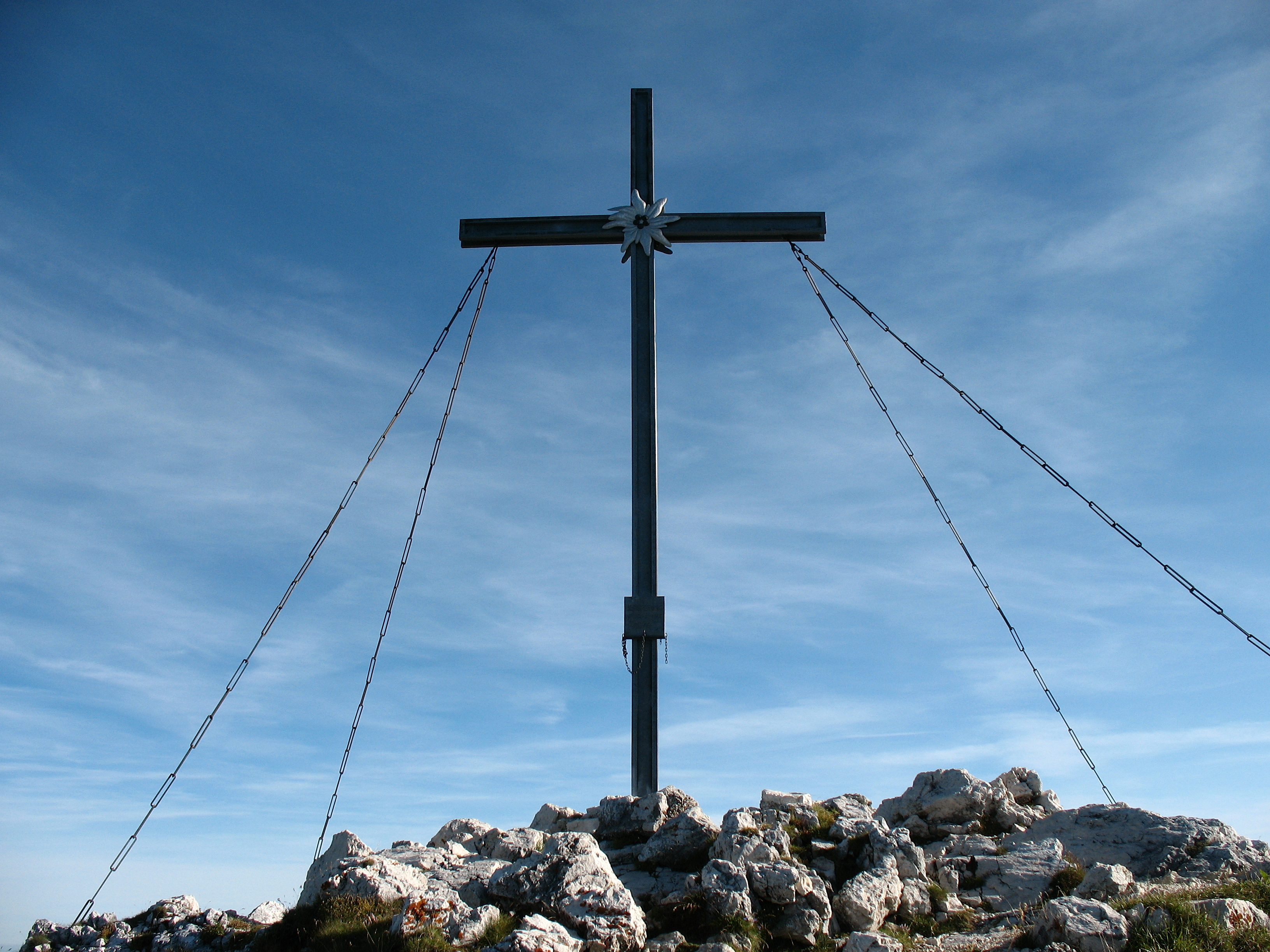 Gipfelkreuz auf dem Gimpel (2173 m).